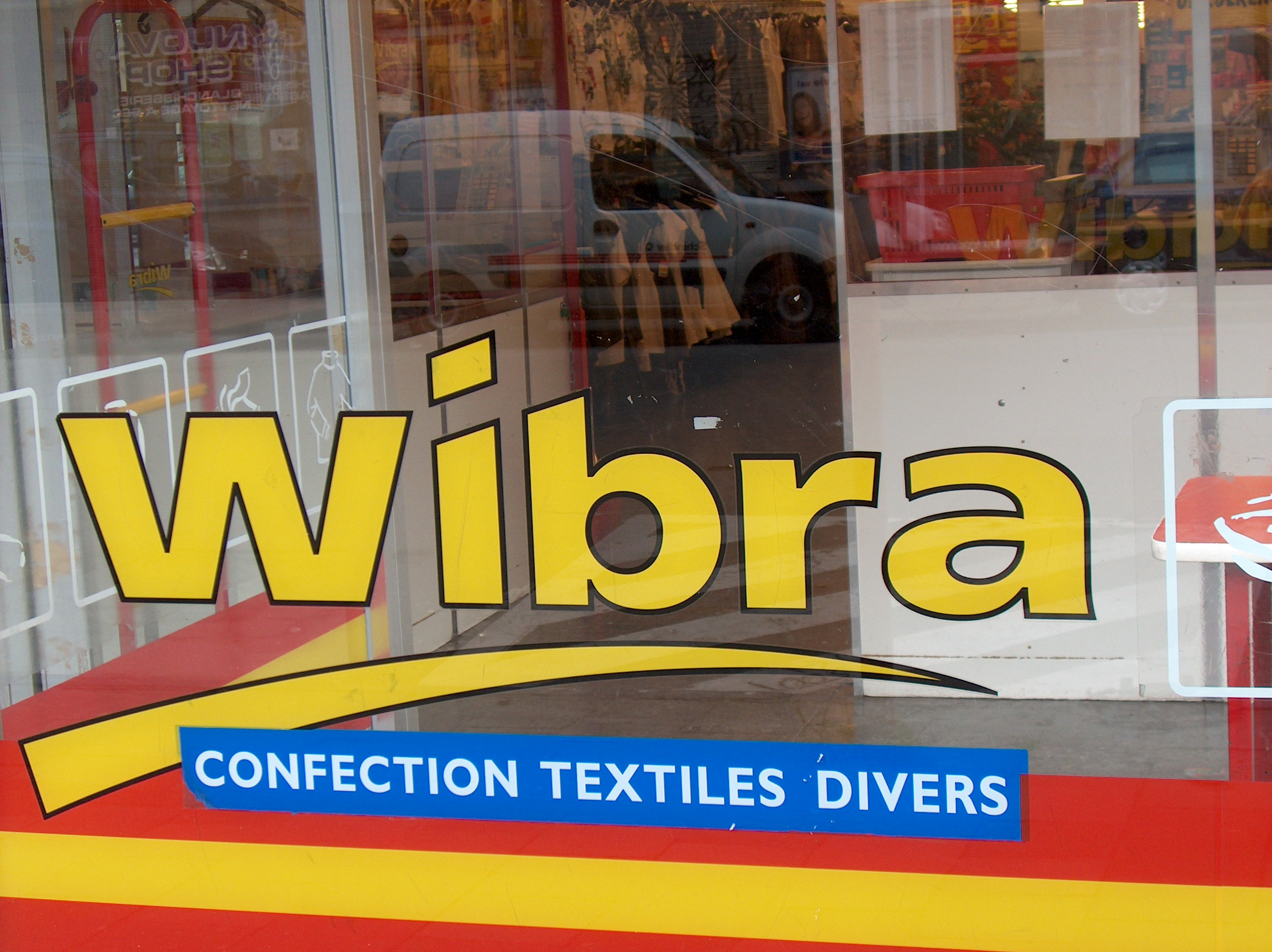 Logo Wibra francophone (Bruxelles).